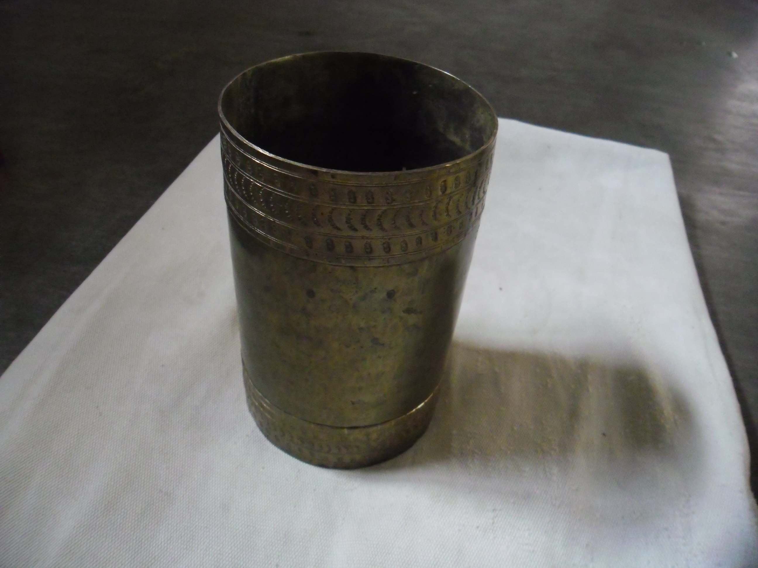 பித்தளையால் செய்யப்பட்ட படி